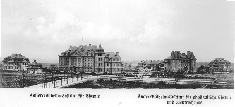 Kaiser-Wilhelm-Institut für Chemie und des Kaiser-Wilhelm-Institut für physikalische Chemie und Elektrochemie in Dahlem (nach 11 Monaten Bauzeit).